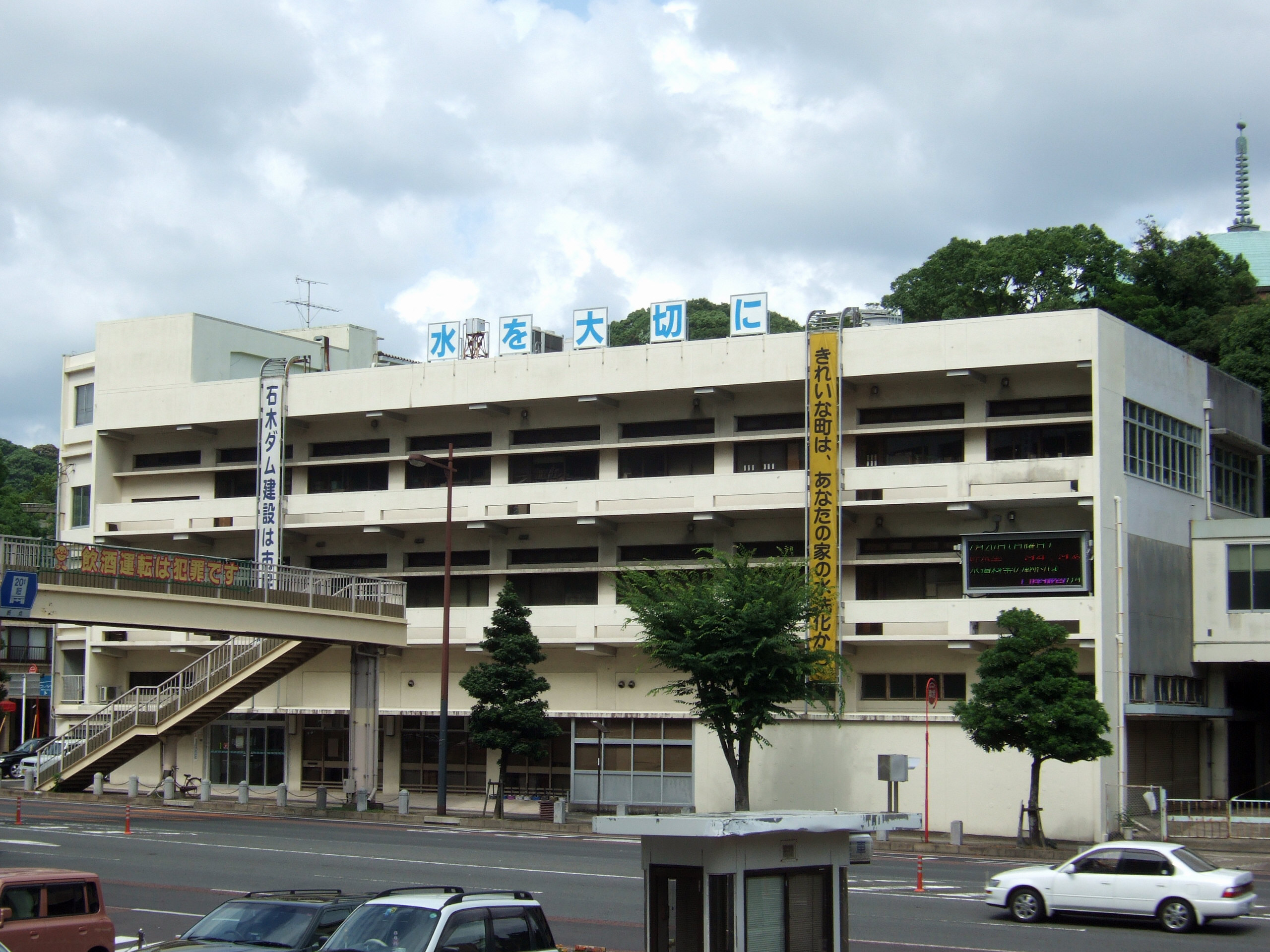 佐世保市水道局庁舎